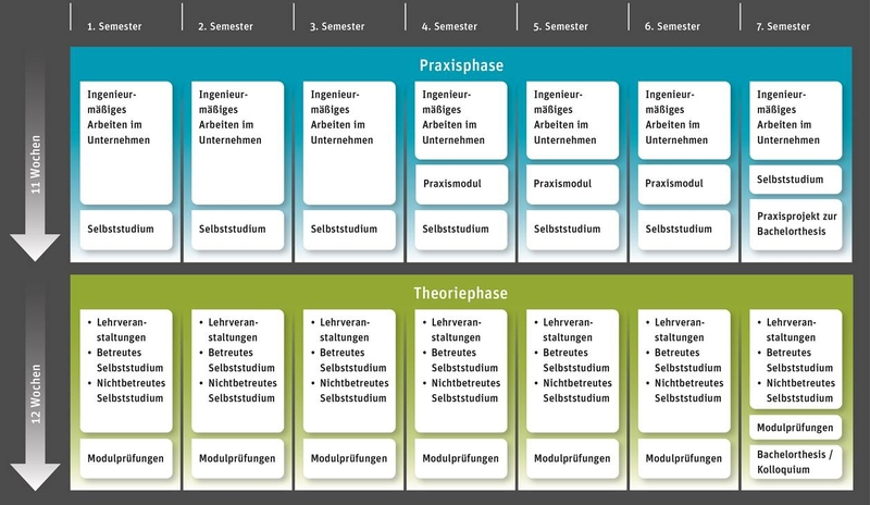 Ablauf eines PI-Studiums am Beispiel Ingenieursstudium der FH Bielefeld